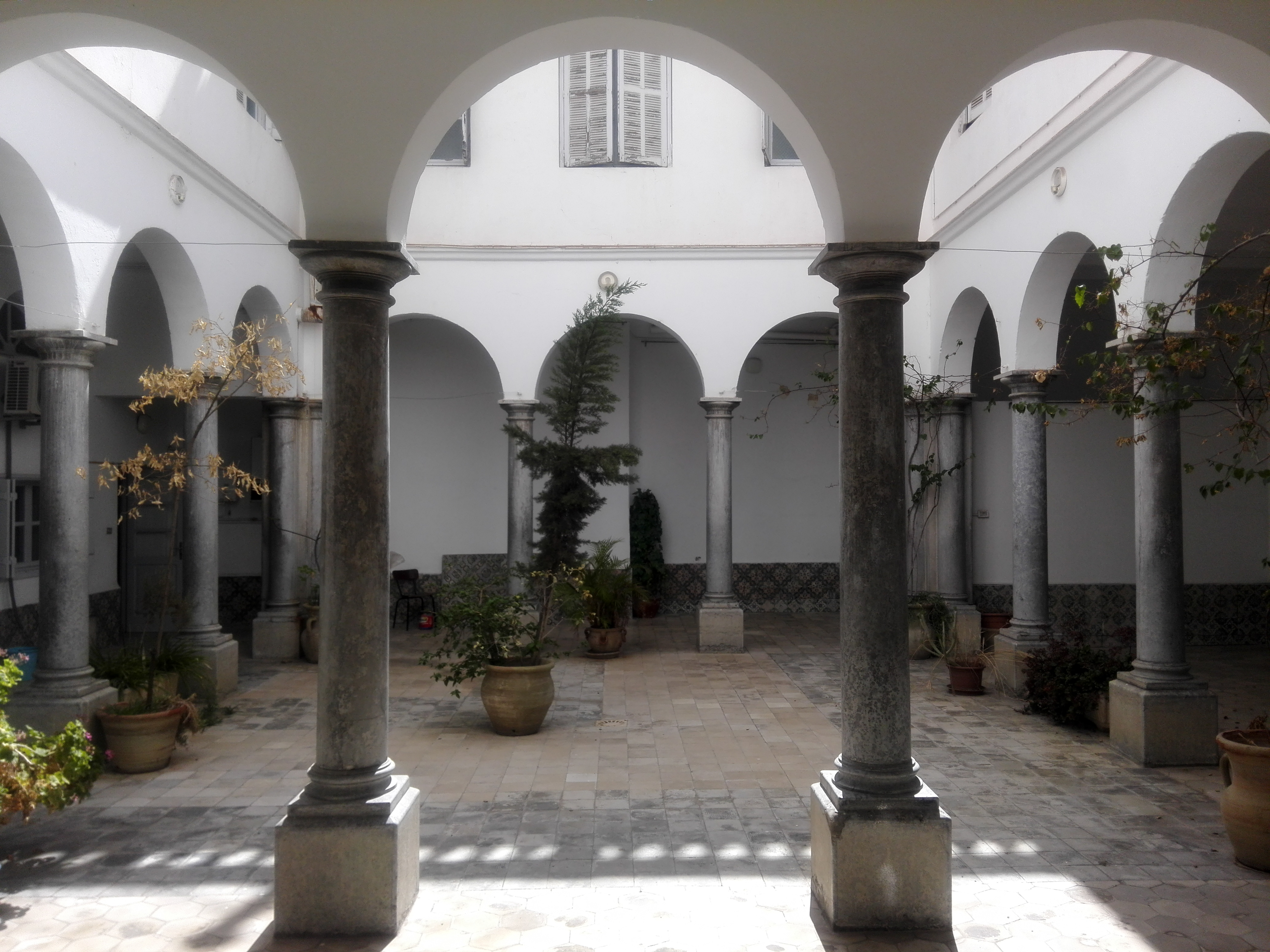 BIBLIOTHÈQUE DIOCÉSAINE À TUNIS